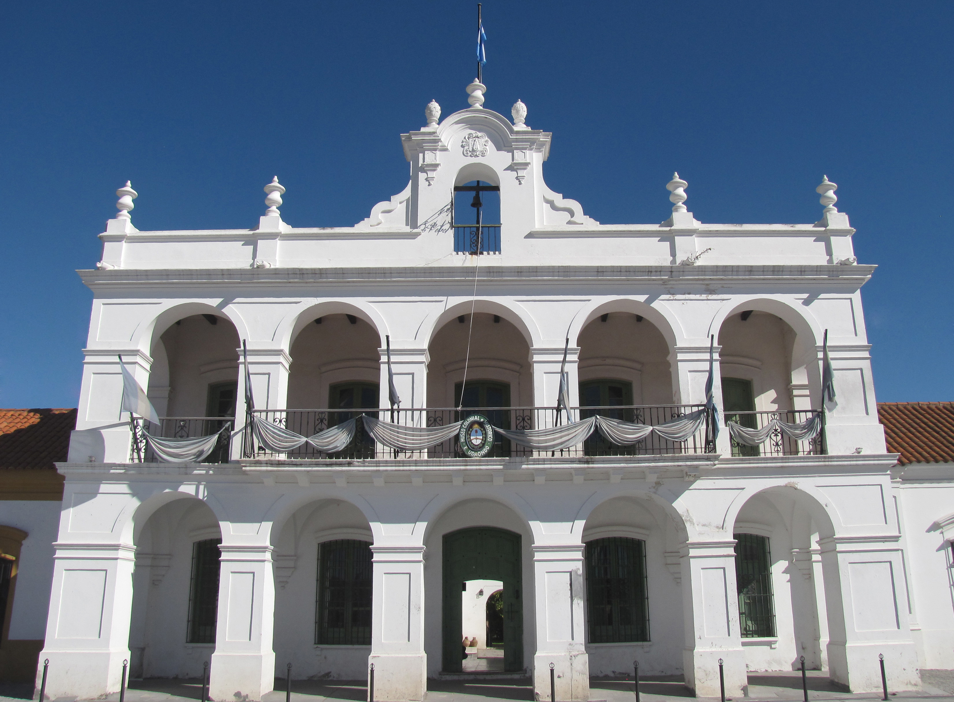 Fachada del Cabildo y Museo Histórico Enrique Udaondo de Luján, provincia de Buenos Aires. Argentina